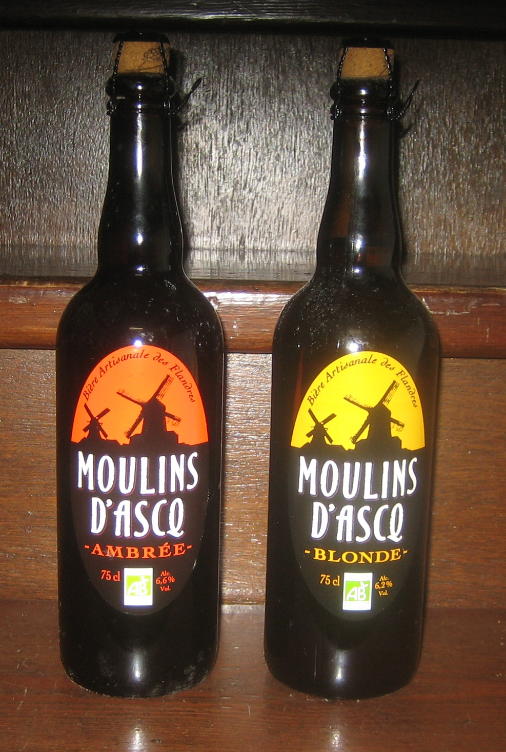 Bouteilles de bière blonde et ambrée Moulins d'Ascq, à Ascq.